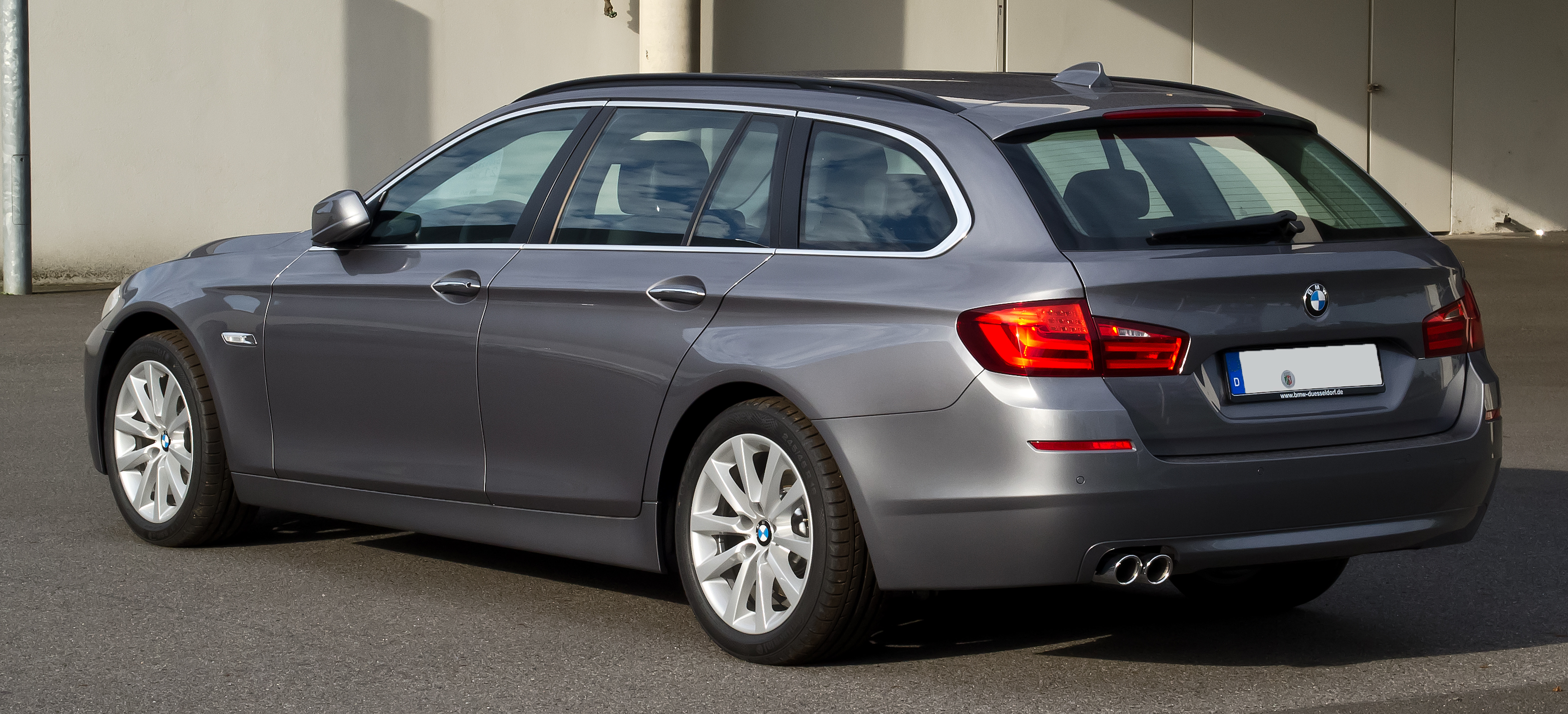 BMW 5er Touring (F11)